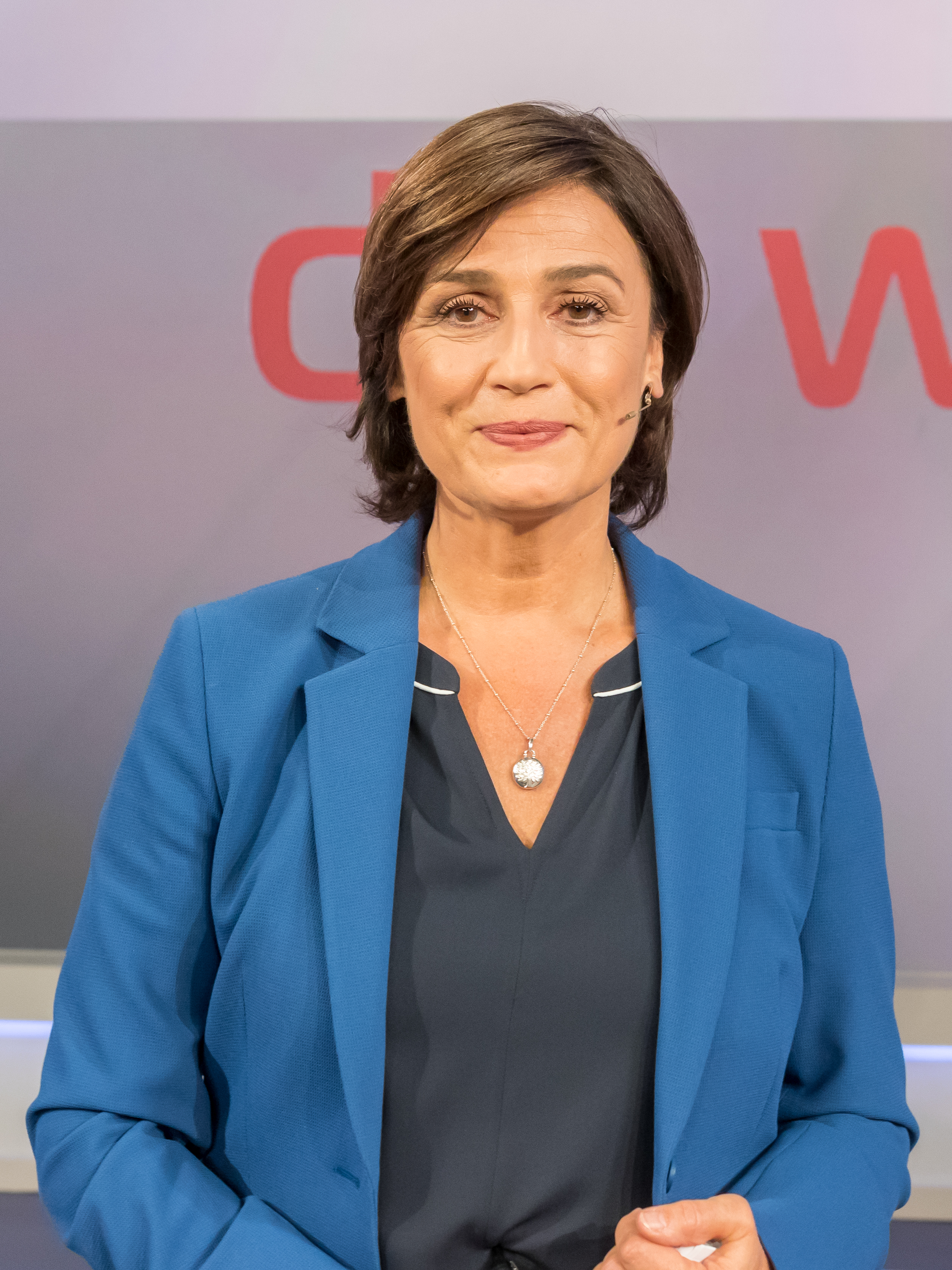 MAISCHBERGER am 14. August 2019 in Köln. Produziert vom WDR. Sommerstaffel „maischberger. die woche“